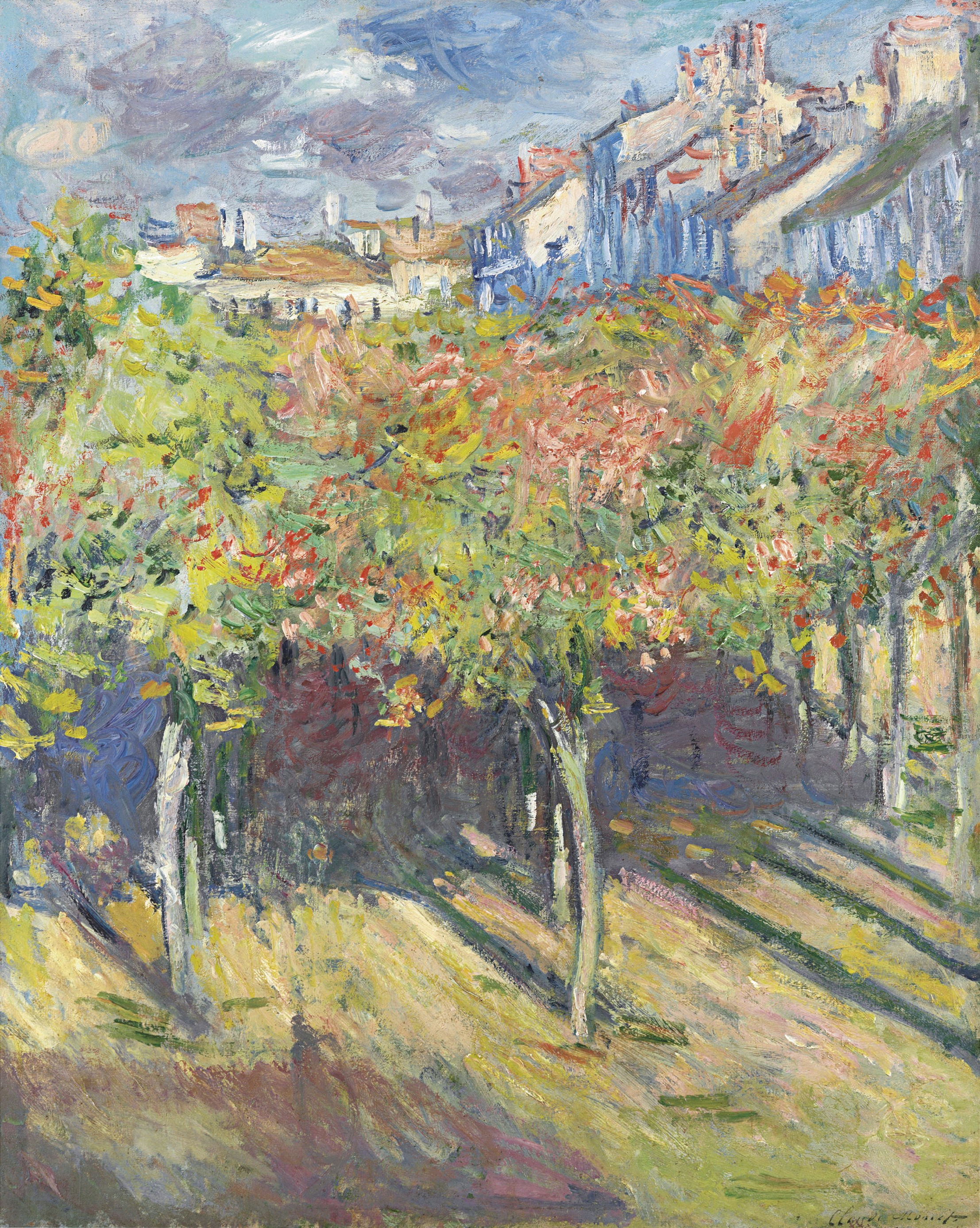 Depicted place: Le cours du 14 juillet vu de la maison de Claude Monet. (48°55′53″N 2°02′06″E / 48.931389°N 2.034917°E)